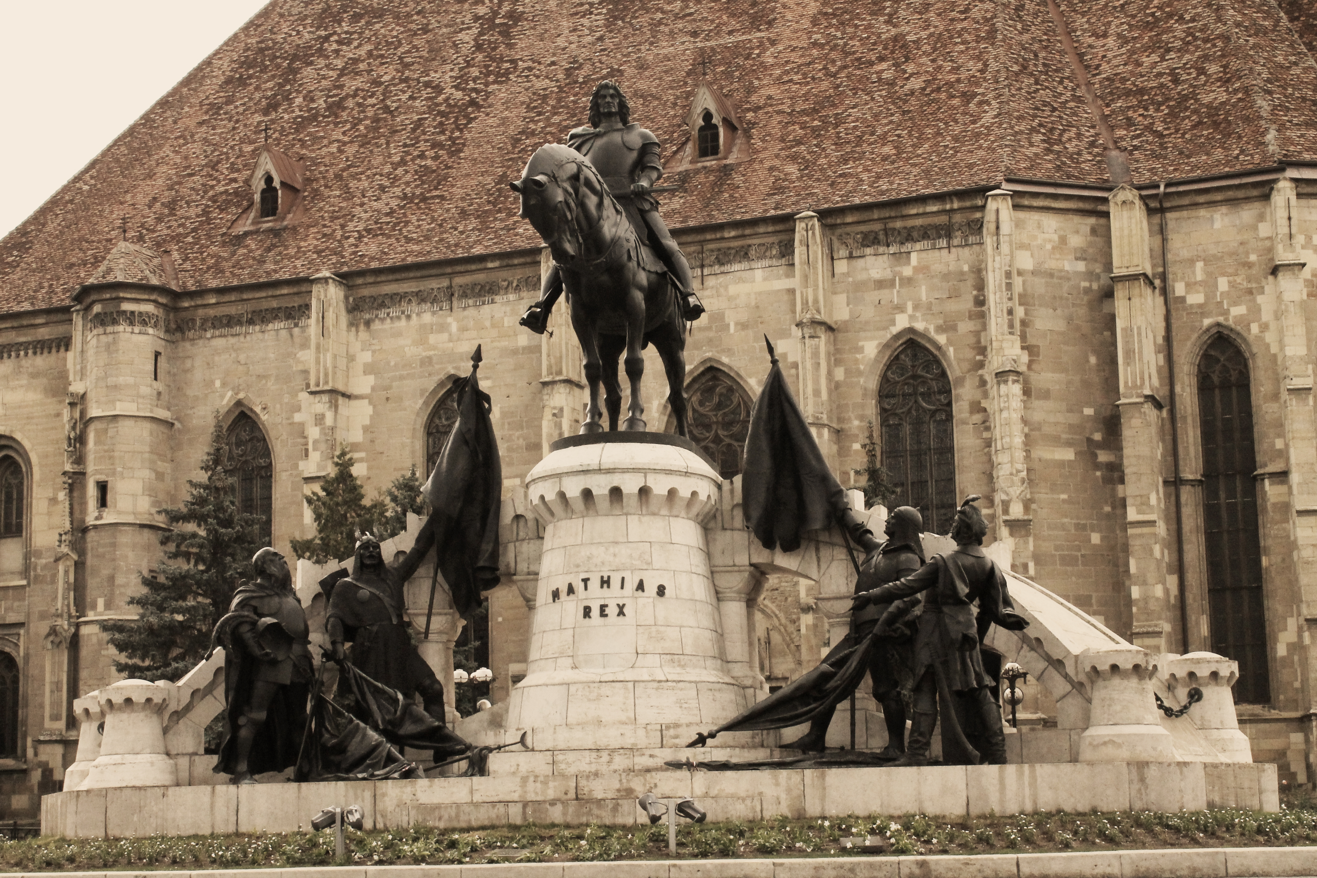 Ansamblul monumental Matei Corvin, alcătuit din cinci statui reprezentându-i pe regele Matia și pe cei patru generali ai săi, a fost dezvelită în anul 1902 în piața centrală a Clujului.